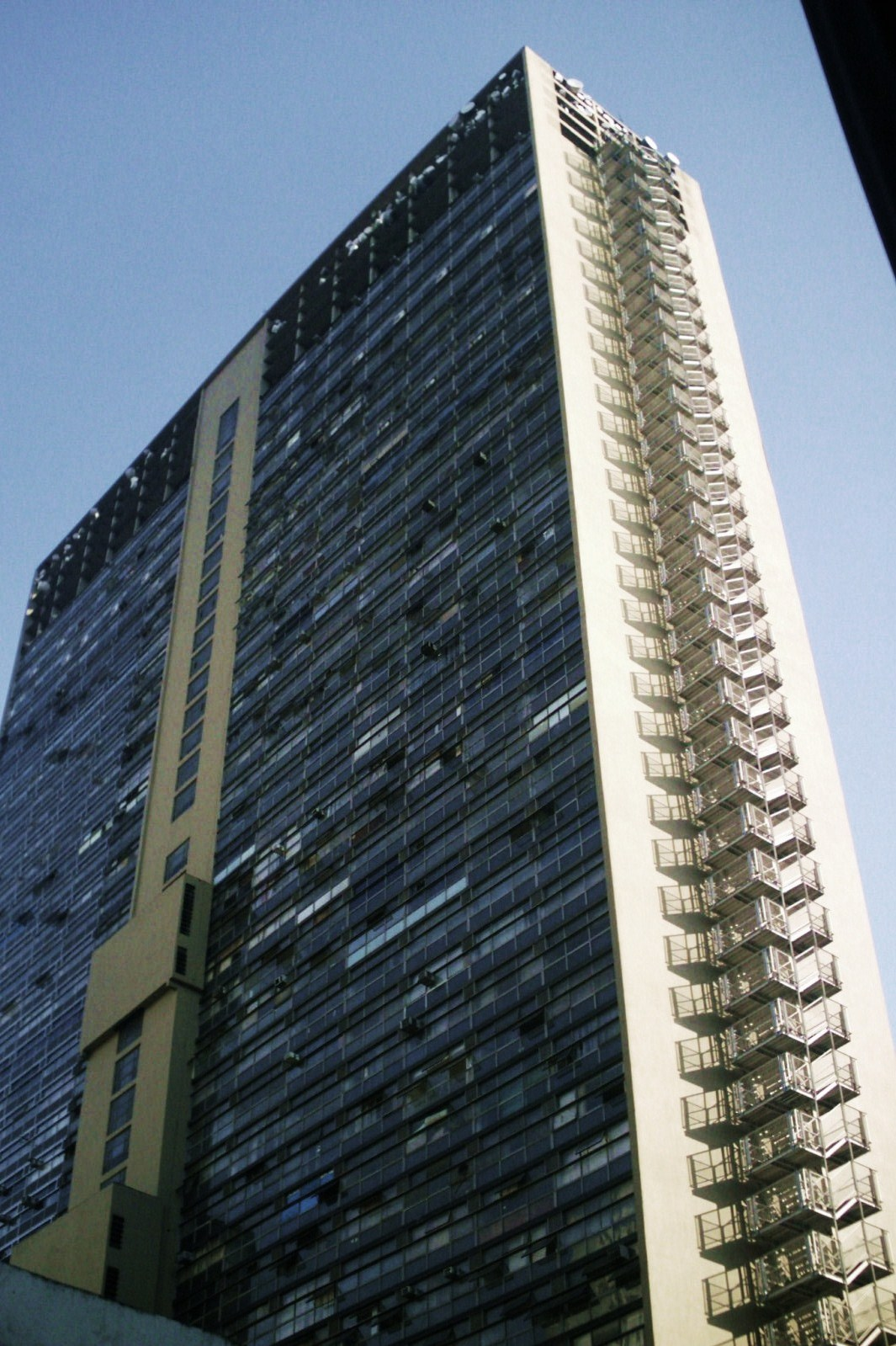 "Mirante do Vale Building" (170 meters) in São Paulo , Brazil.